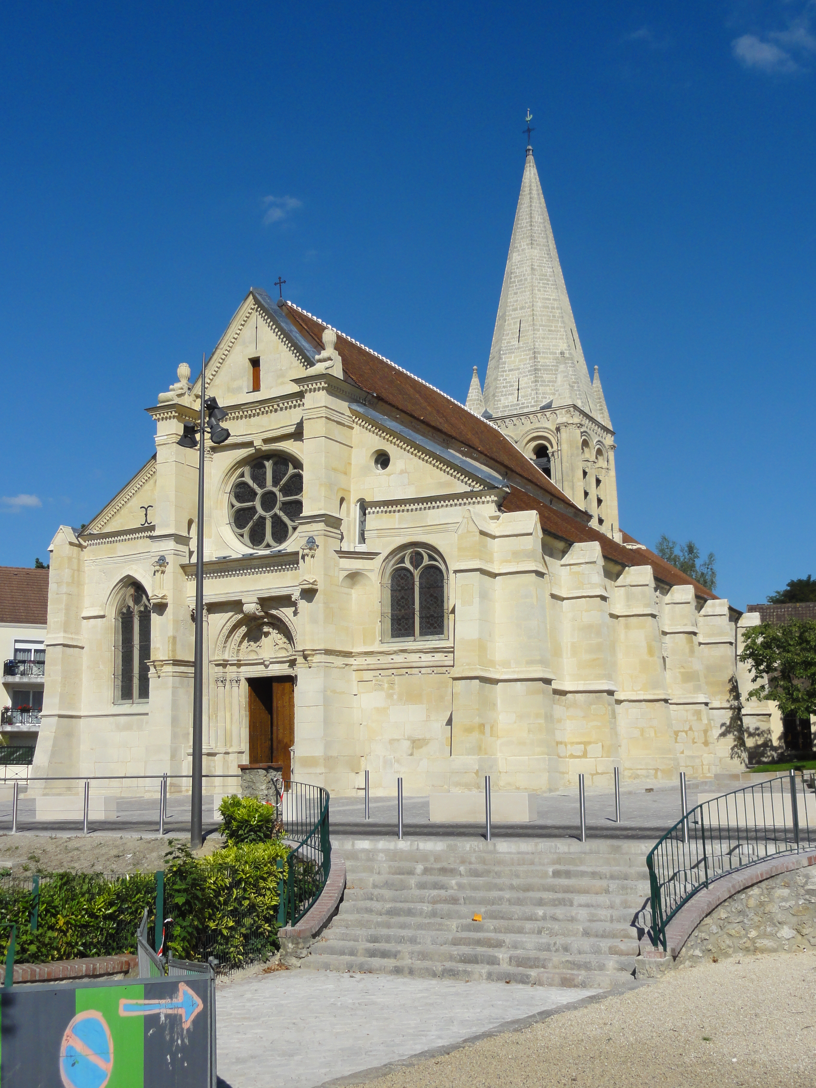 L'église Saint-Pierre-et-Saint-Paul de Sarcelles après sa restauration en 2014-2015 - voir titre.